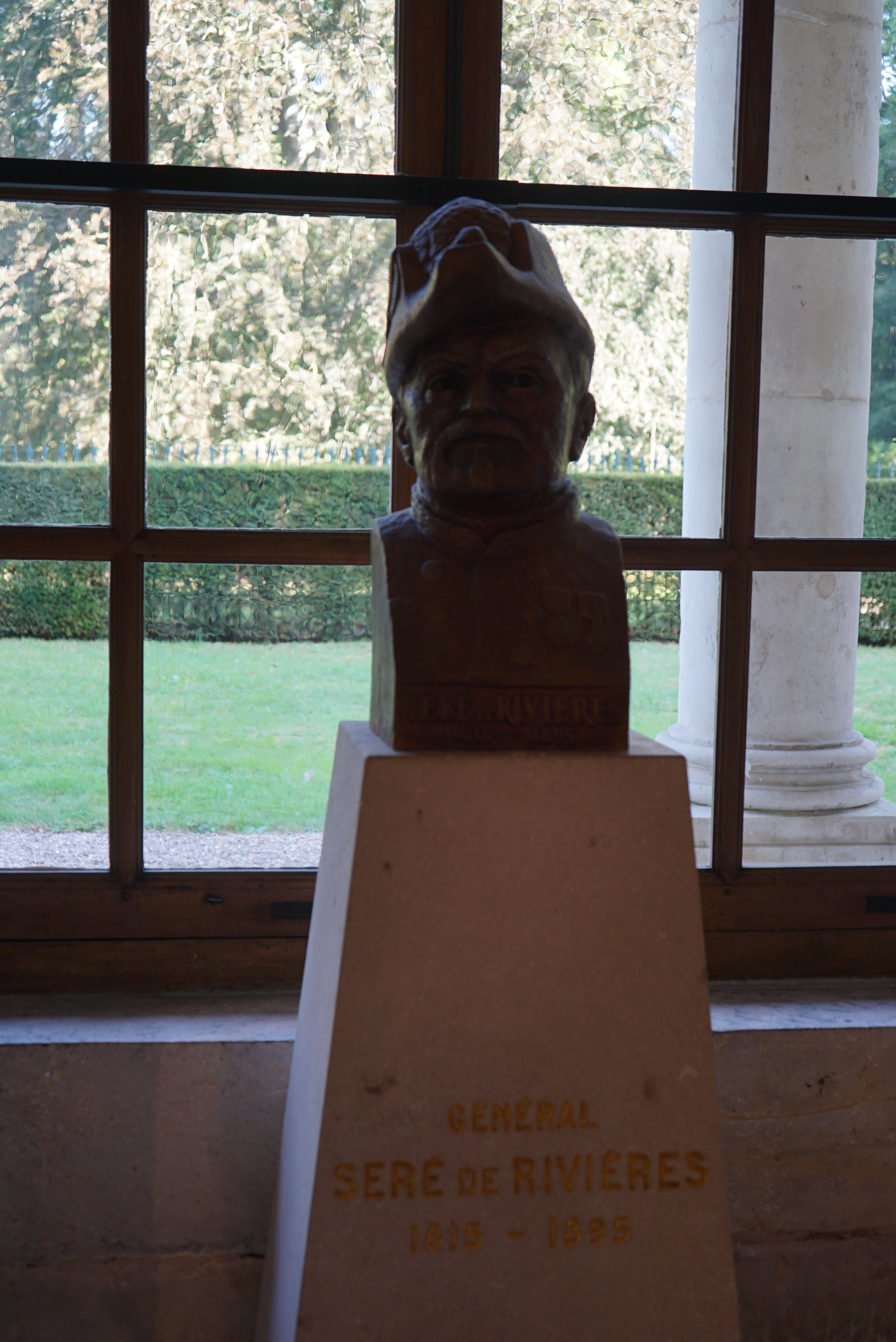 au rez de chaussée du palais.